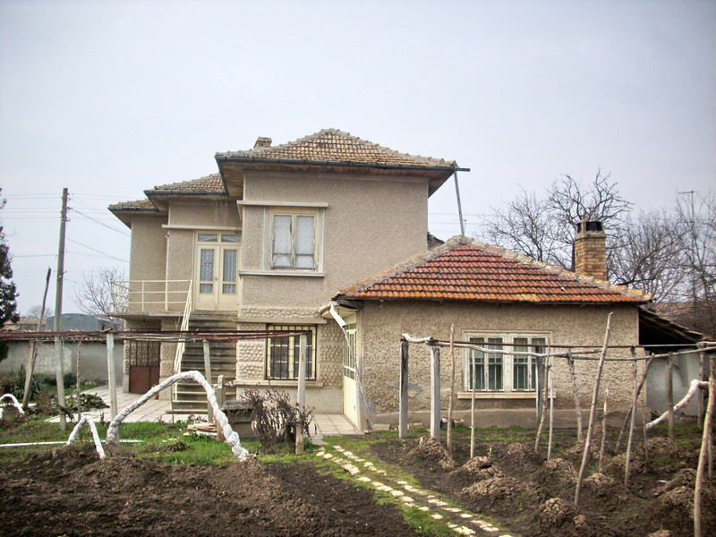 Село Кардам, община Попово. Селска къща с двор.